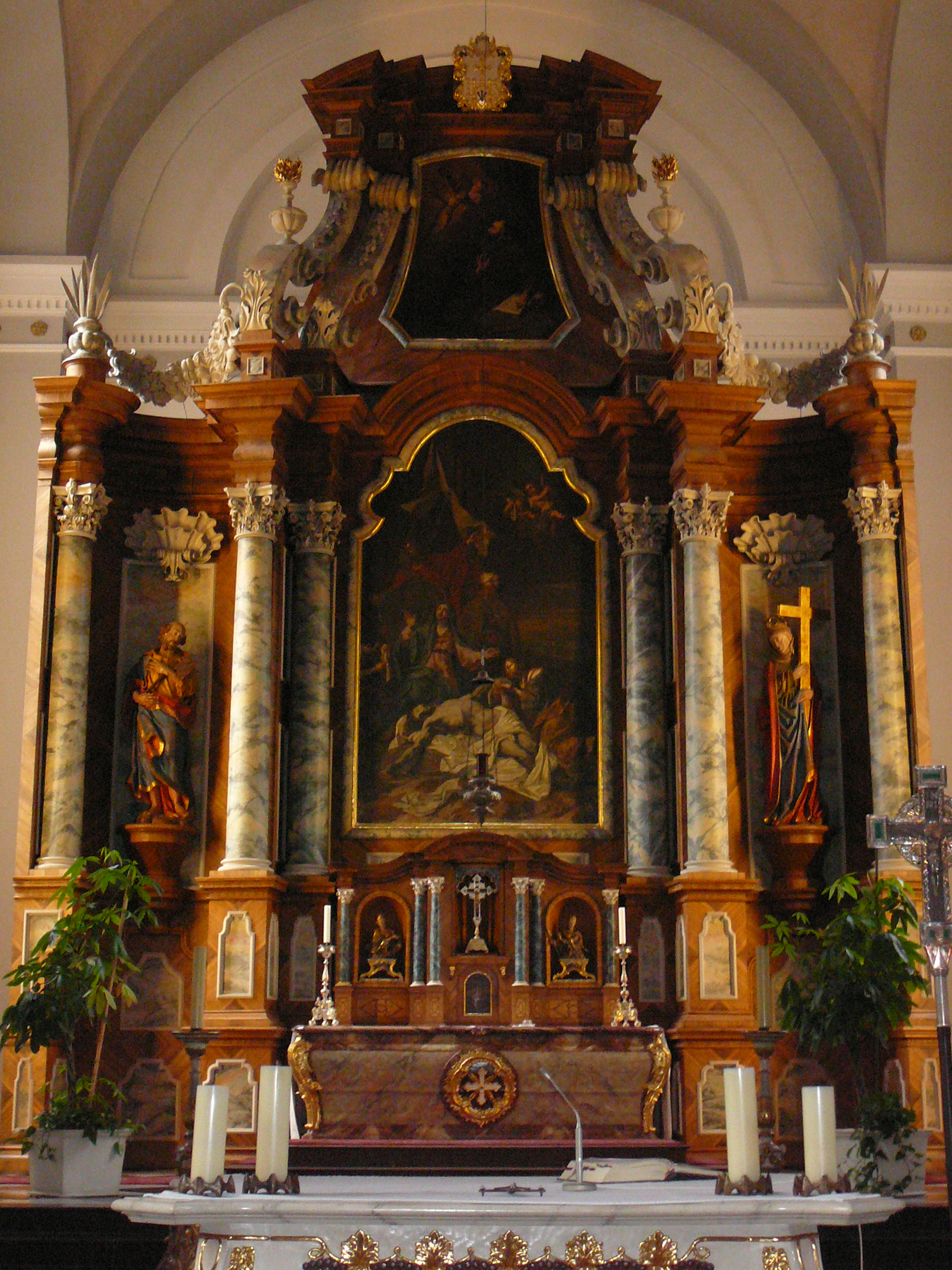 Sankt Laurentius, Friedrich-Ebert-Str. 20, Wuppertal-ElberfeldThis is a photograph of an architectural monument.